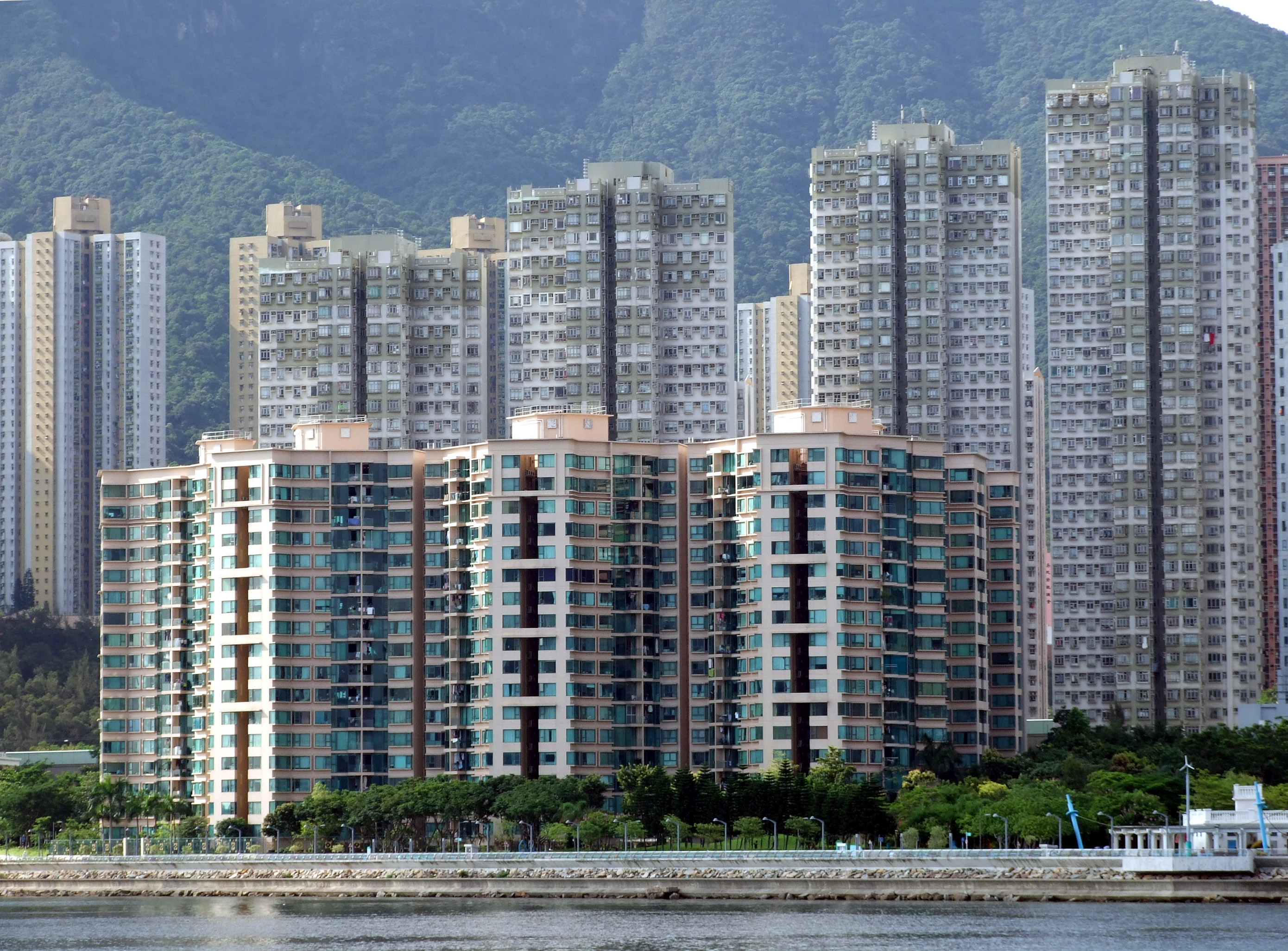 中文（香港）: 海典居